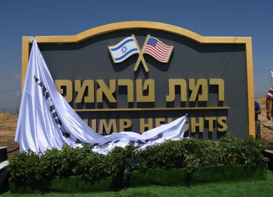 כניסה לישוב שלט